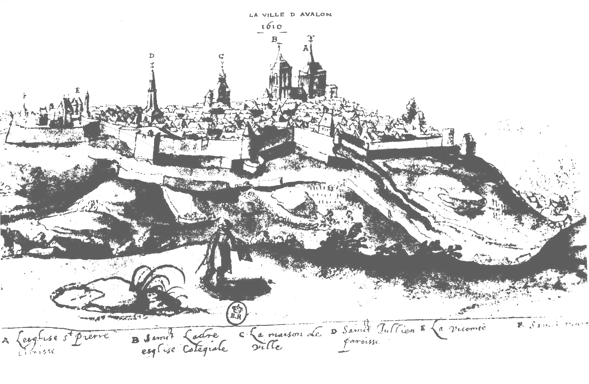 Dessin d'Avallon